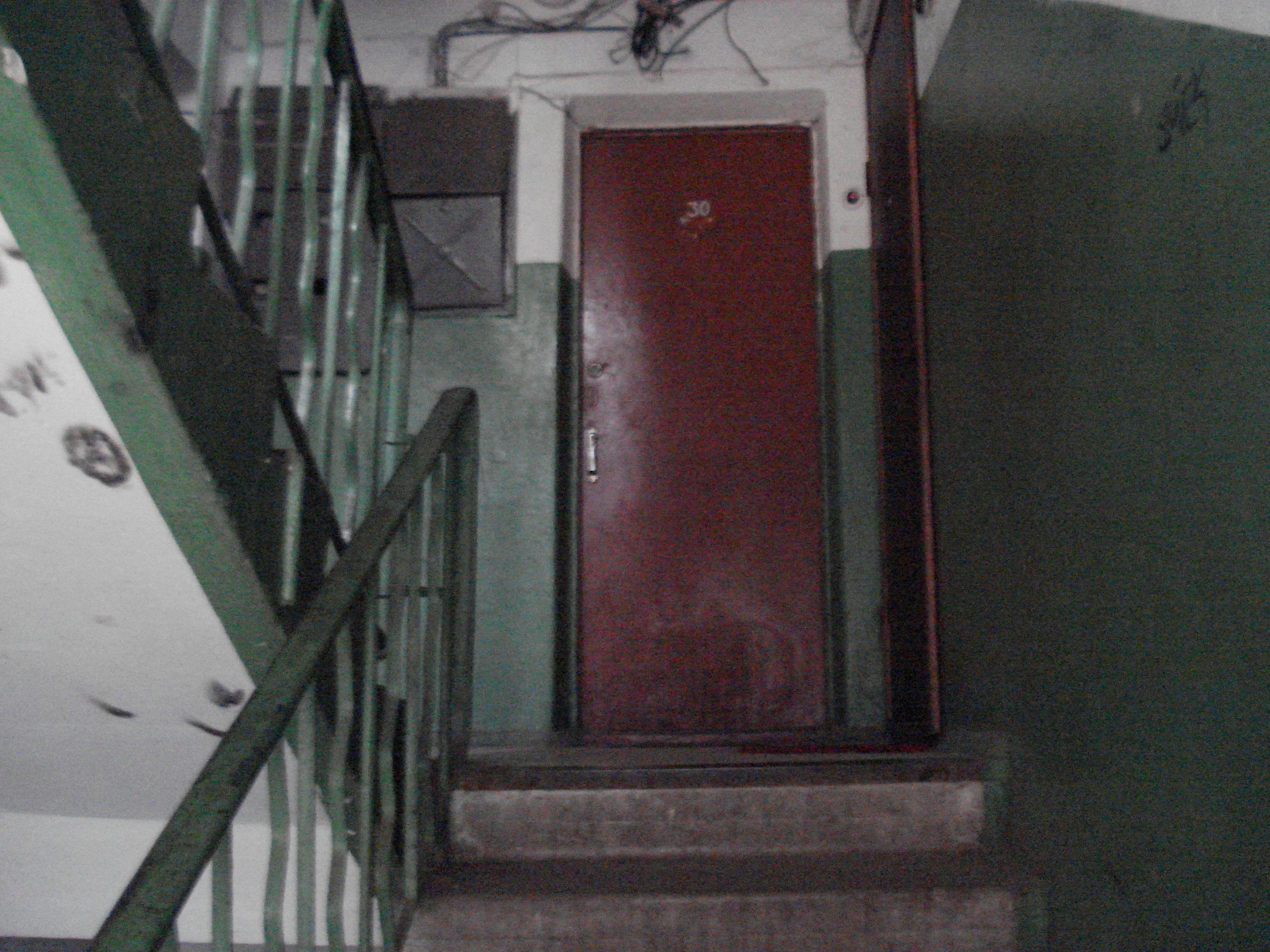 Подъезд хрущёвки